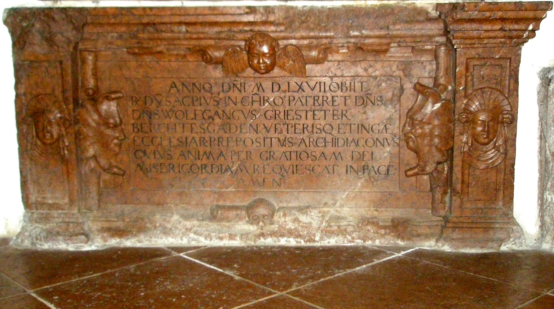 Grabdenkmal (Ausschnitt: Sockel mit Text) von Wolfgang II. Griesstätter zu Haslach (1490–1567) im Franziskanerkloster Berchtesgaden